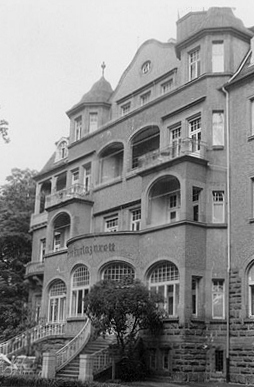 Marinekurlazarett Bad Kissingen im Jahr 1953